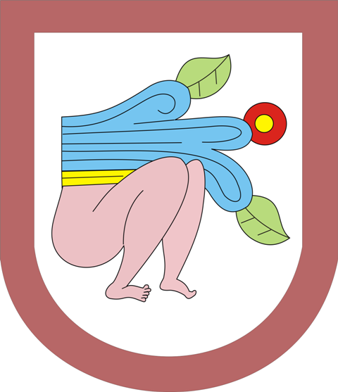 Atzingo, "En la agüita"